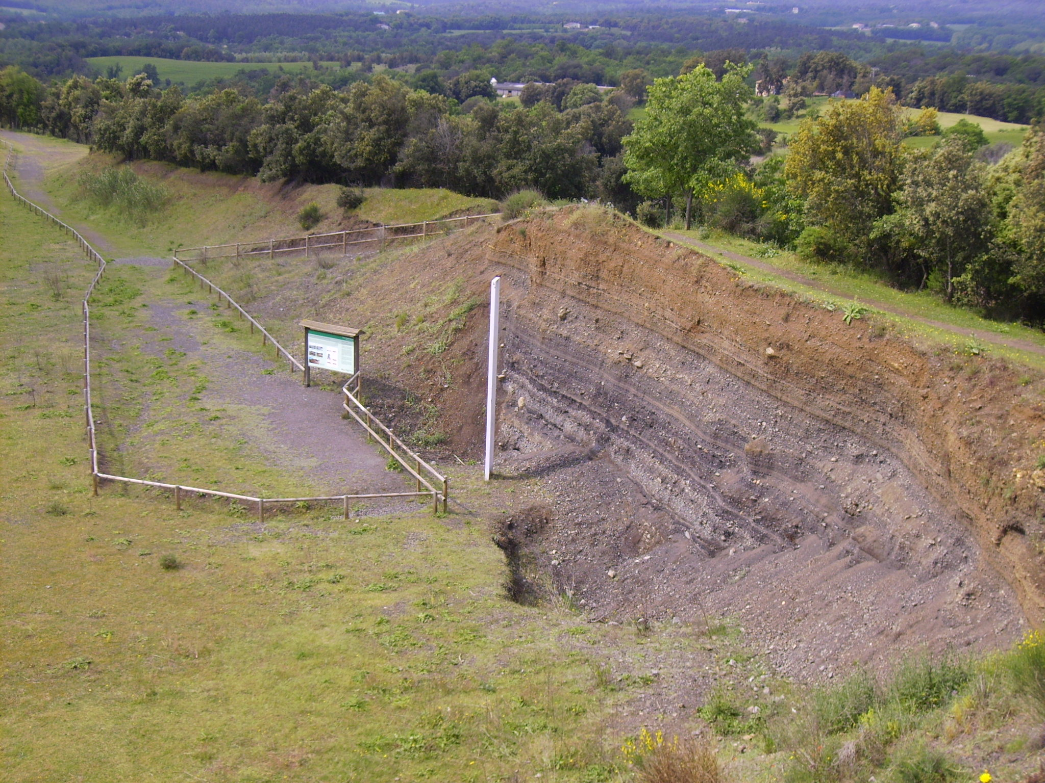 Ermita de Sant Llop (Vilobí d'Onyar)